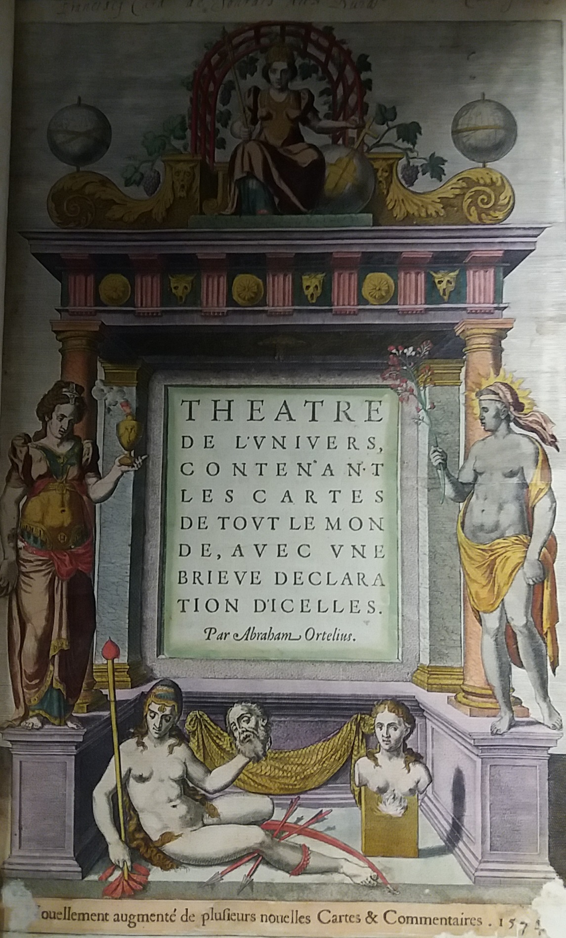 Page de titre du Théâtre de l'univers, contenant les cartes de tout le monde, avec une brieve declaration d'icelles. Par Abraham Ortelius. Nouvellement augmenté de plusieurs cartes & commentaires. 1574. [6 f.], 53 f. doubles, [3 f.]: titre-front. et cartes gr. s. c.; in-fol. Privilège du 21 février 1569. - Achevé d'imprimé au colophon : "Imprimé, à la requeste & aux despens de l'autheur, par Gillis de de Diest, imprimeur juré de Sa Majesté. En Anvers, l'an M.CCCCC.LXXII". Sig. 3 A2-A4 53 a3. Rel. veau blond, dos doré à 6 nerfs, gardes à tourniquets, 18e siècle. Ex-libris ms. au titre : "Francisc. Card. de Sourdis Arch. Burd. catalogo inscriptus". - Cachet de la bibliothèque de la Ville de Bordeaux